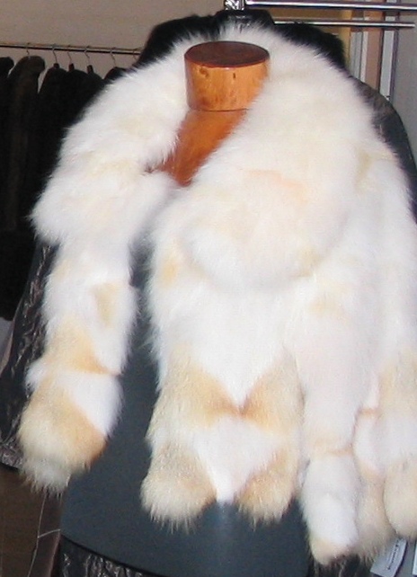 Pelzmodelle Fahnenstich, Martinistraße 12, 45657 Recklinghausen: Inhaber Andreas Fahnenstich: rechts vorn Kitfuchs-Wammen-Jacke.